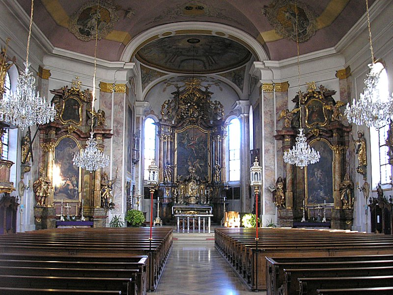 Pfarrkirche St. Michael (Mering, Landkreis Aichach-Friedberg, Bayerisch-Schwaben). Innenansicht nach Osten. Eigene Aufnahme, März 2007 / Parish church St. Michael (Mering near Augsburg, Bavaria, Germany). Interior, looking east. Own photo, March 2007